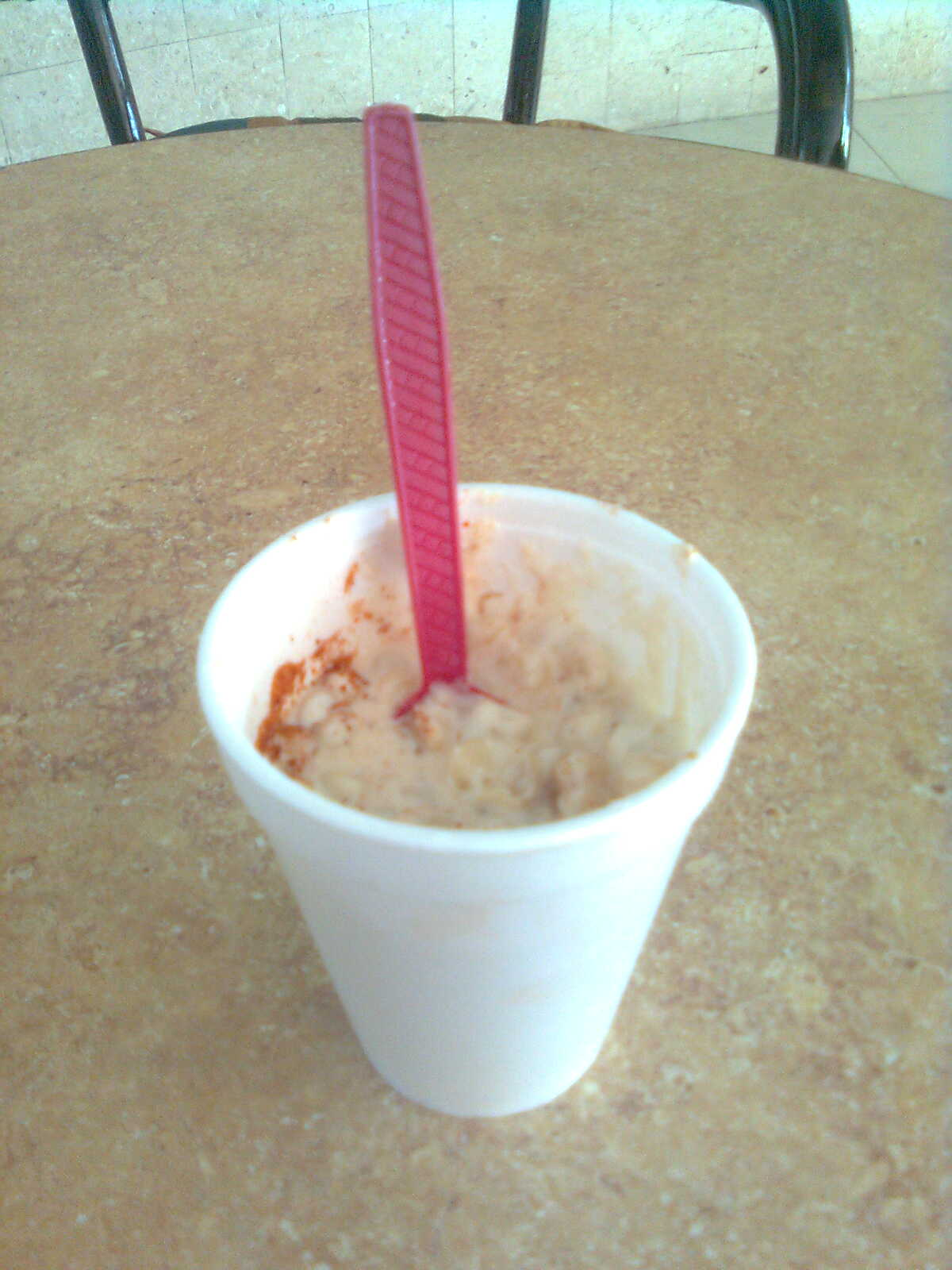 Esquite.